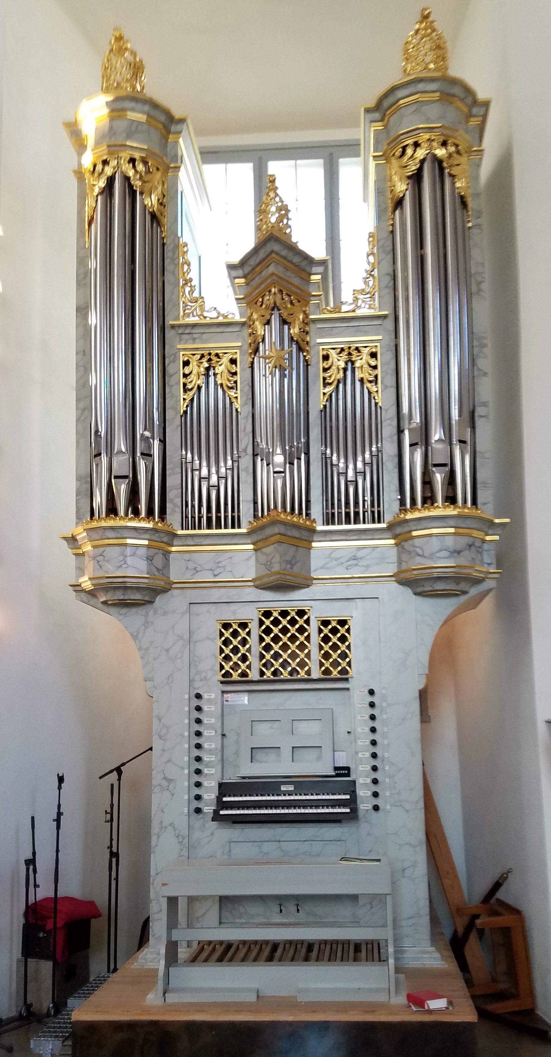 Kalmar, Dom: Chororgel (Sune Fondell, 1998)